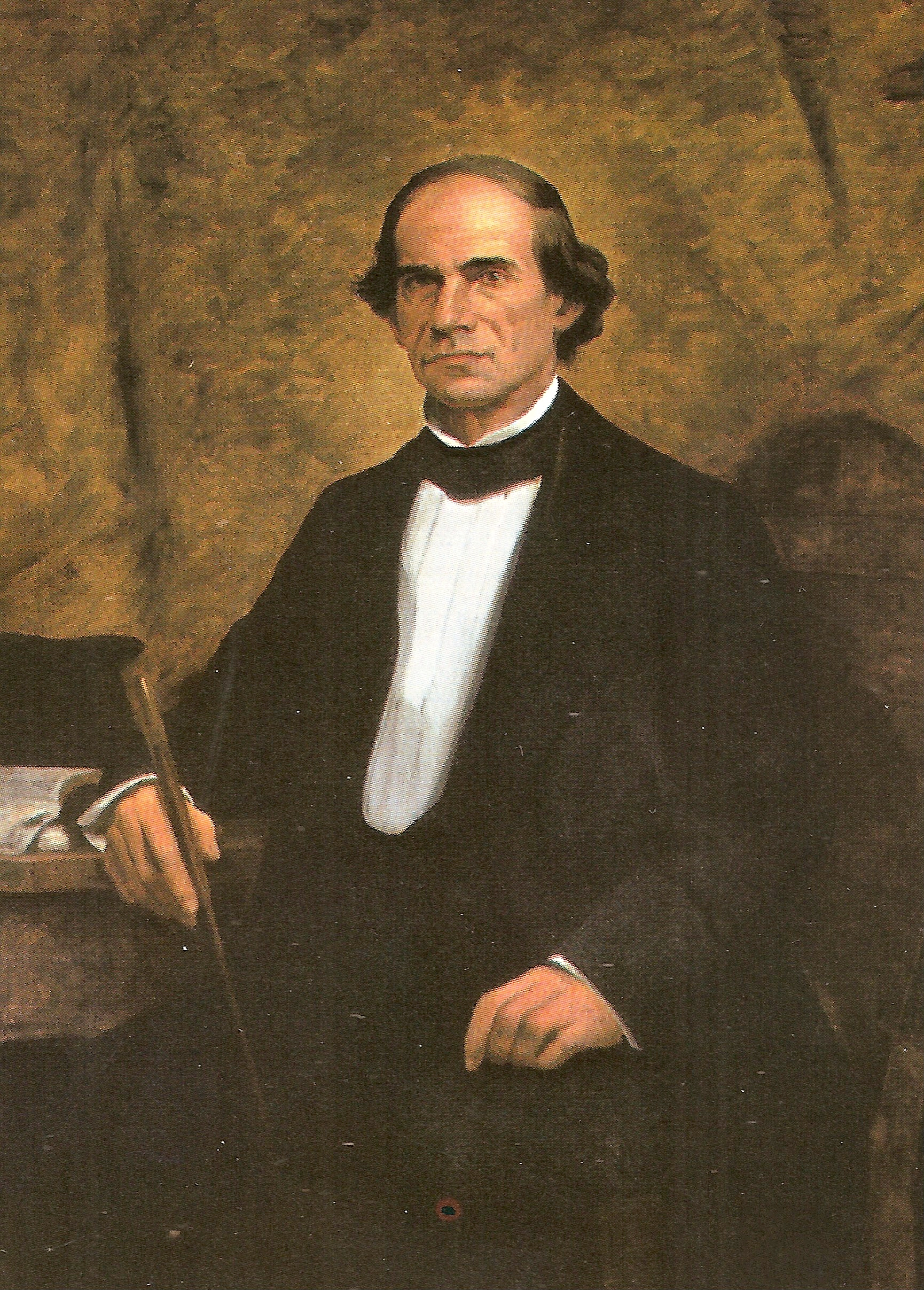 Fermín Toro. 1897. Óleo/Tela. Colección del Ministterio de Relaciones Exteriores. Caracas - Venezuela